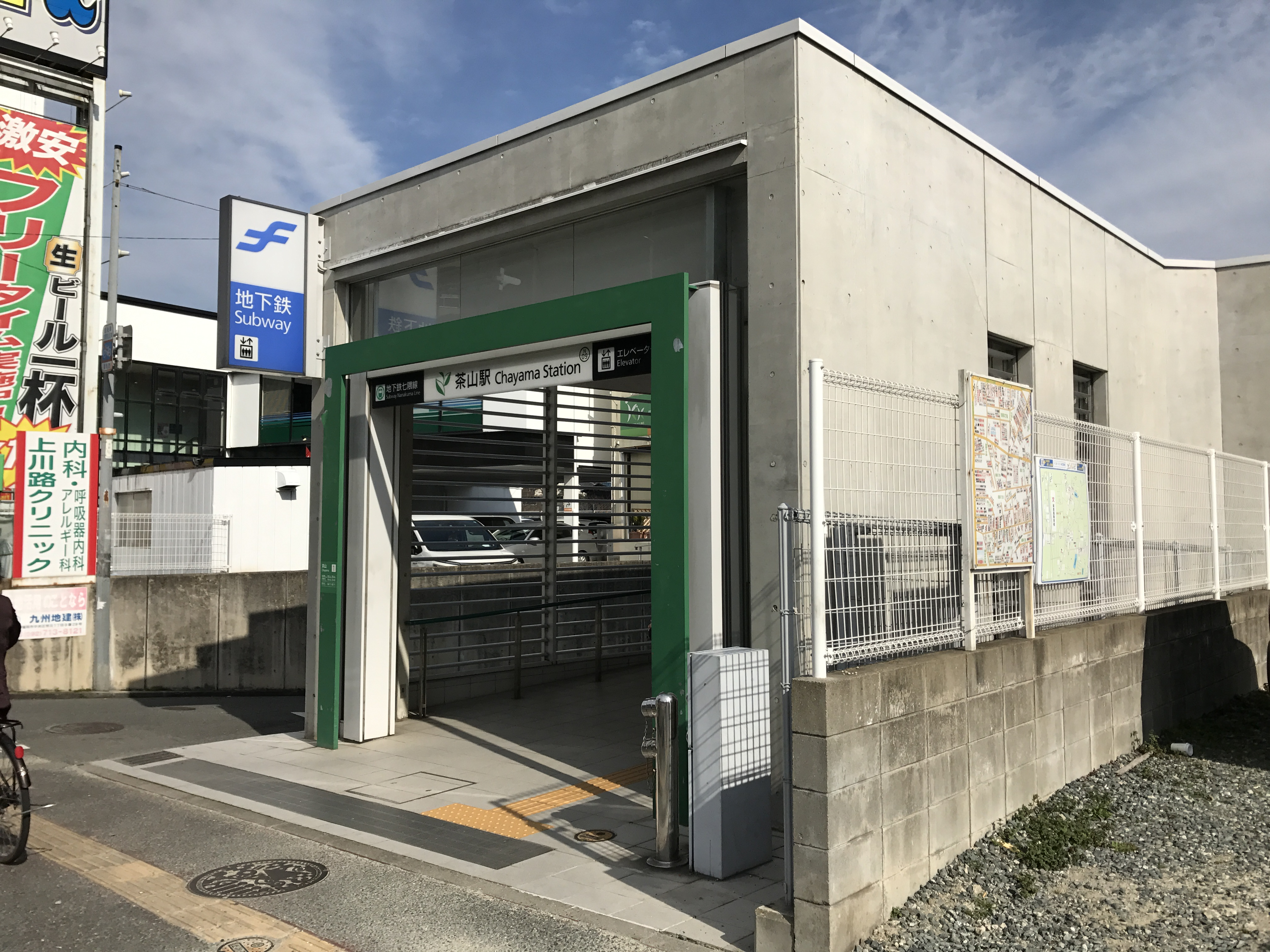 茶山駅の1番出入り口